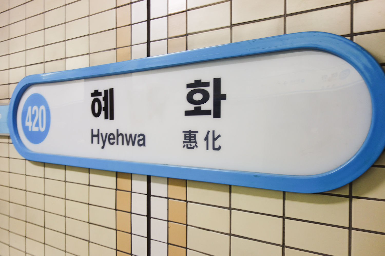 惠化駅 駅名票